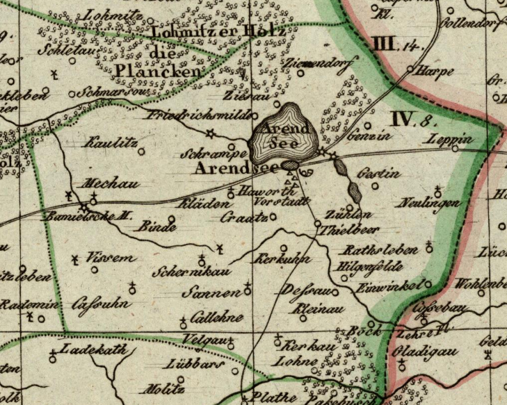 Der Kanton Arendsee (1807-13) im Königreich Westphalen